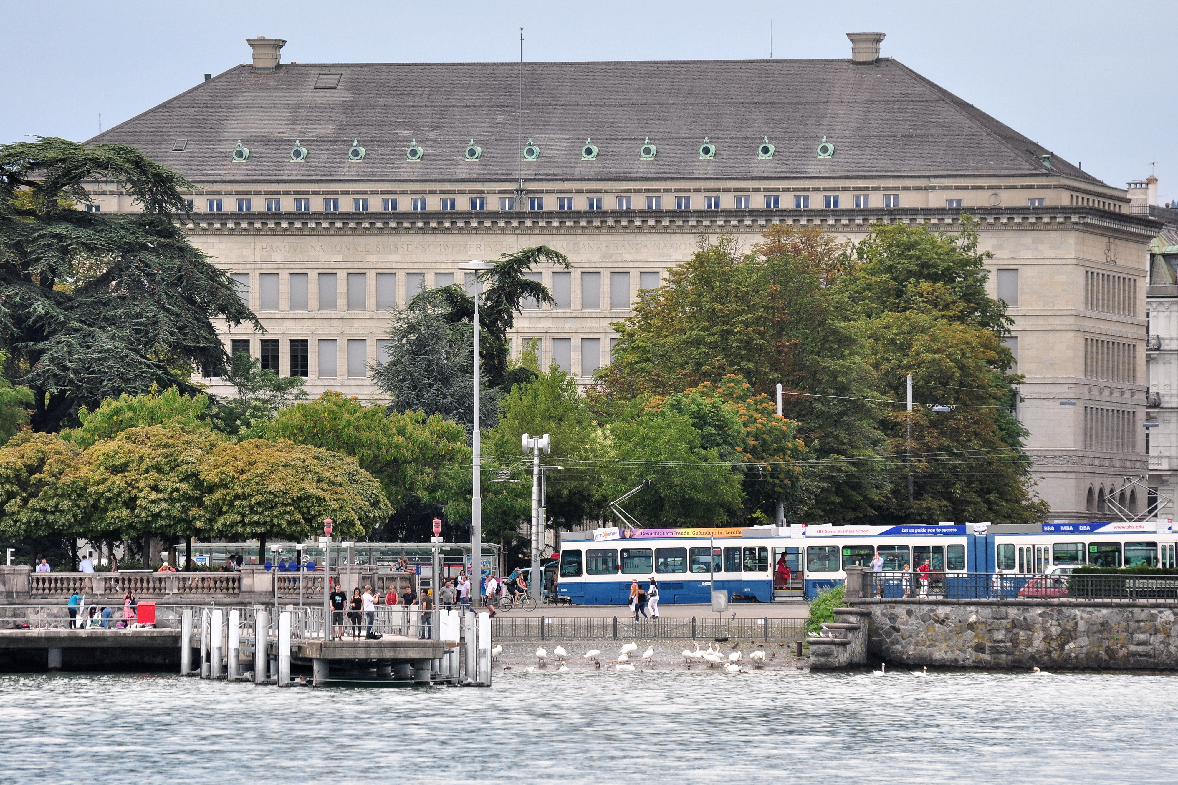 Schweizerische Nationalbank, Bürkliplatz in Zürich (Switzerland), as seen from Zürichsee-Schifffahrtsgesellschaft (ZSG) motorship Helvetia.